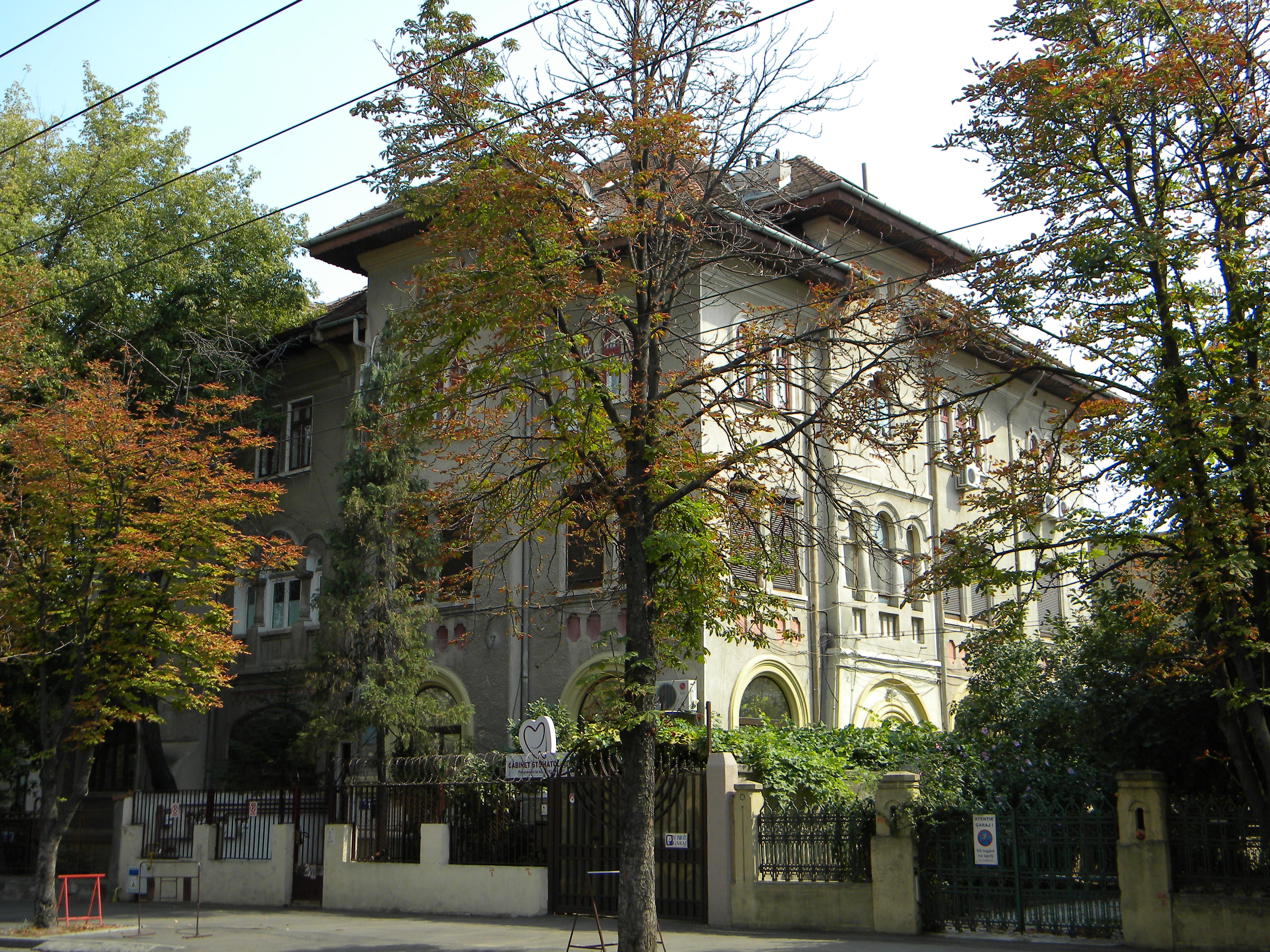 Casa nr 71 pe Bd. Eroii Sanitari, Bucuresti, sect. 5